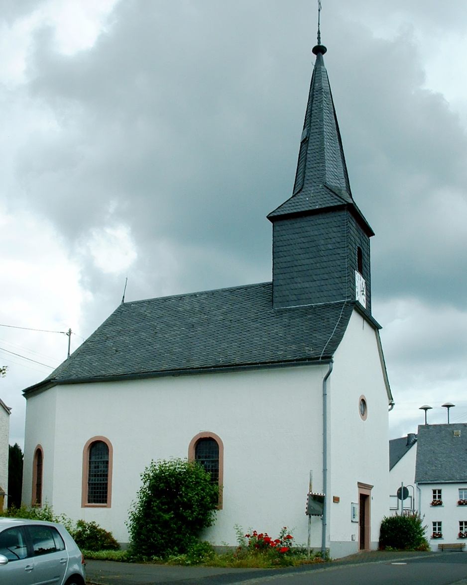 Evangelische Kirche Gornhausen, Hunsrück, Rheinland-Pfalz